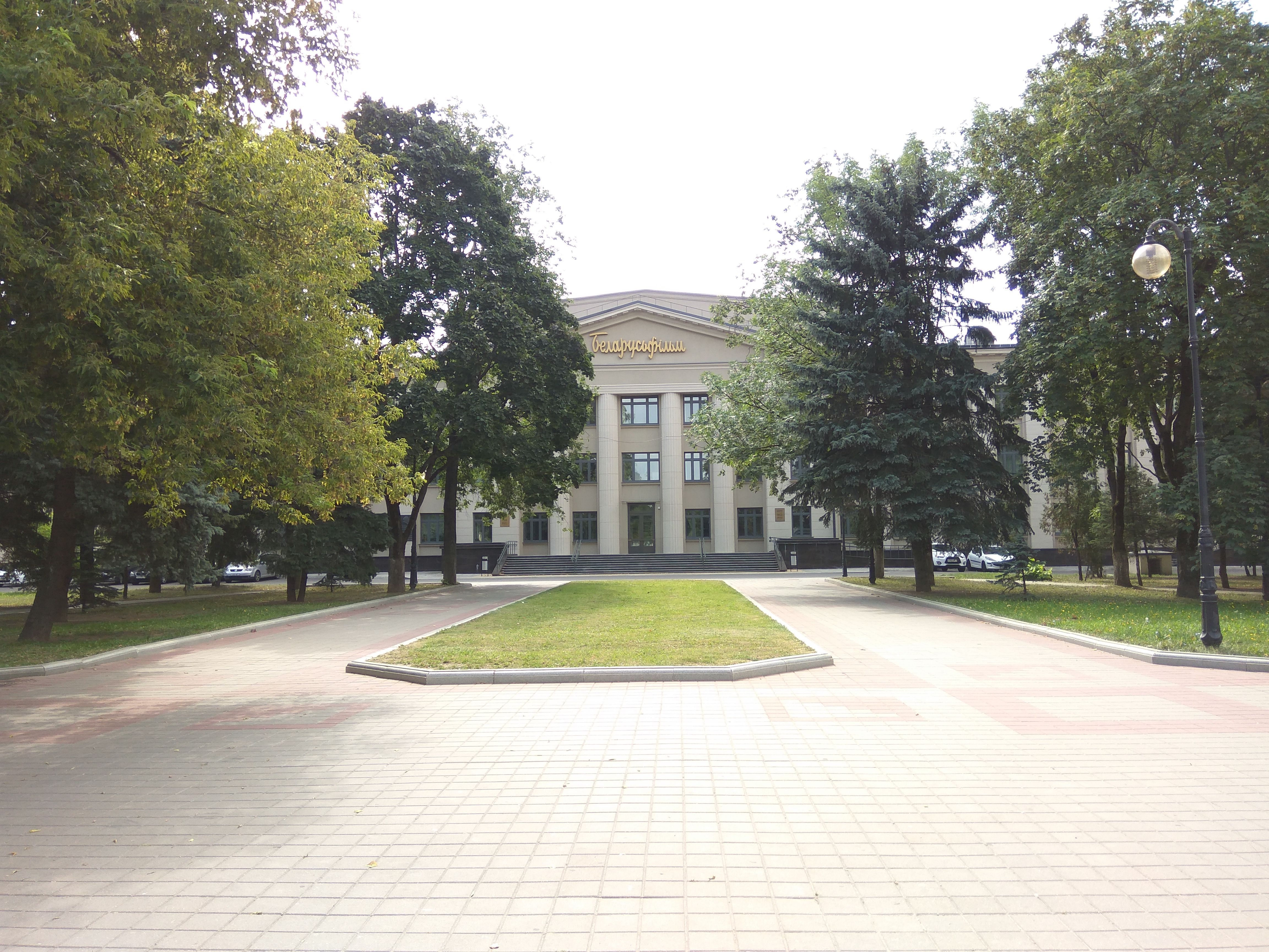 Мінск. Галоўны корпус Беларусьфільм